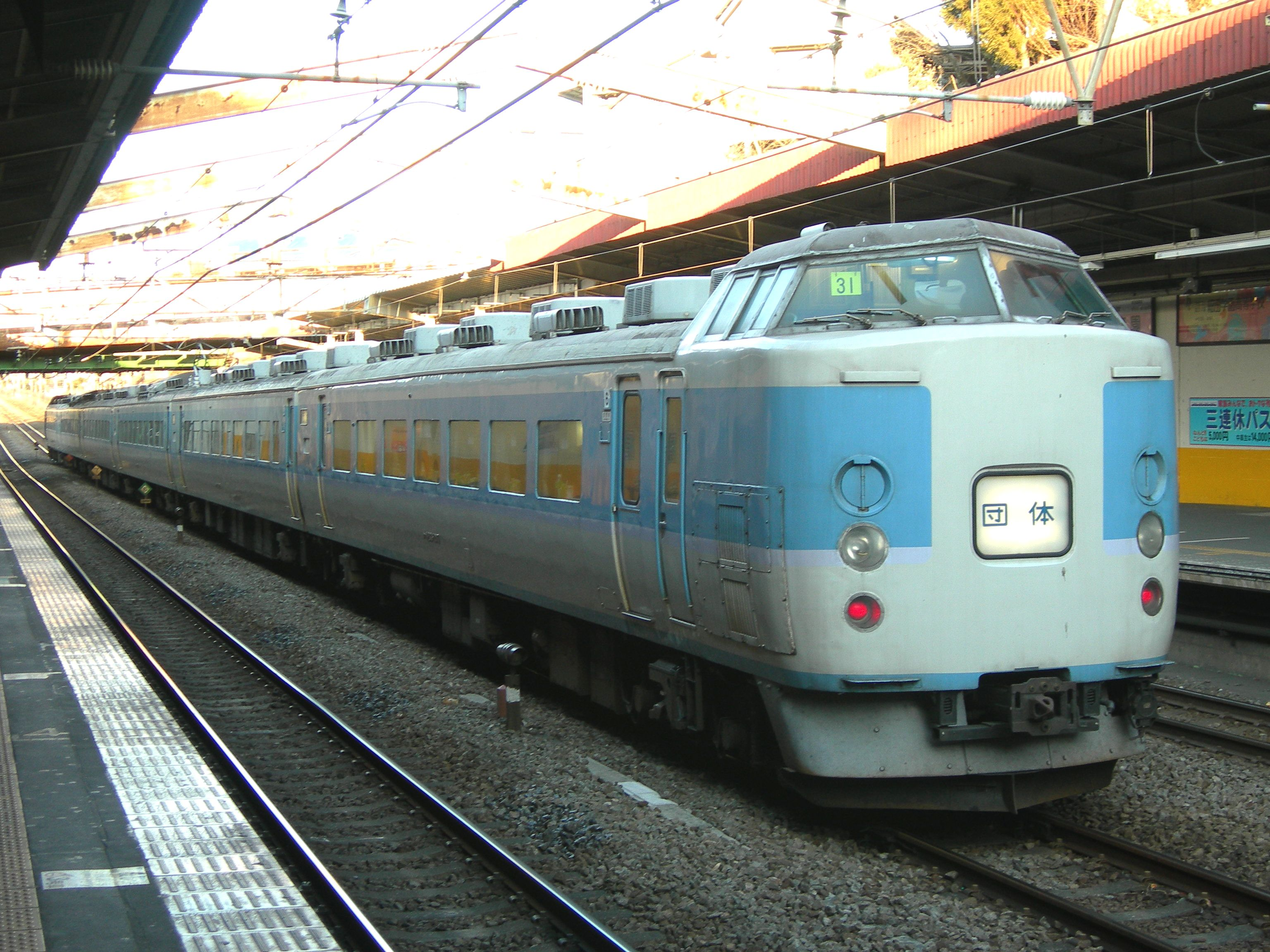 JR東日本 183系 マリ31編成